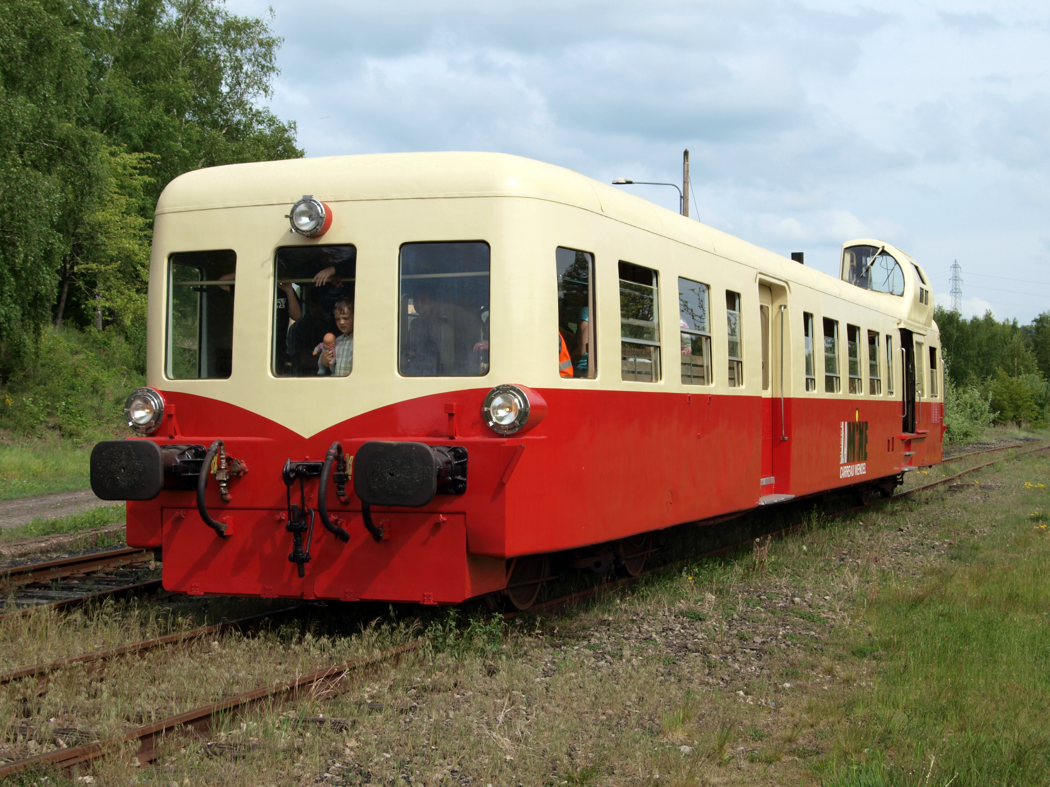 Mine museum diesel locomotive autorail Picasso X4042 at Petite-Rosselle